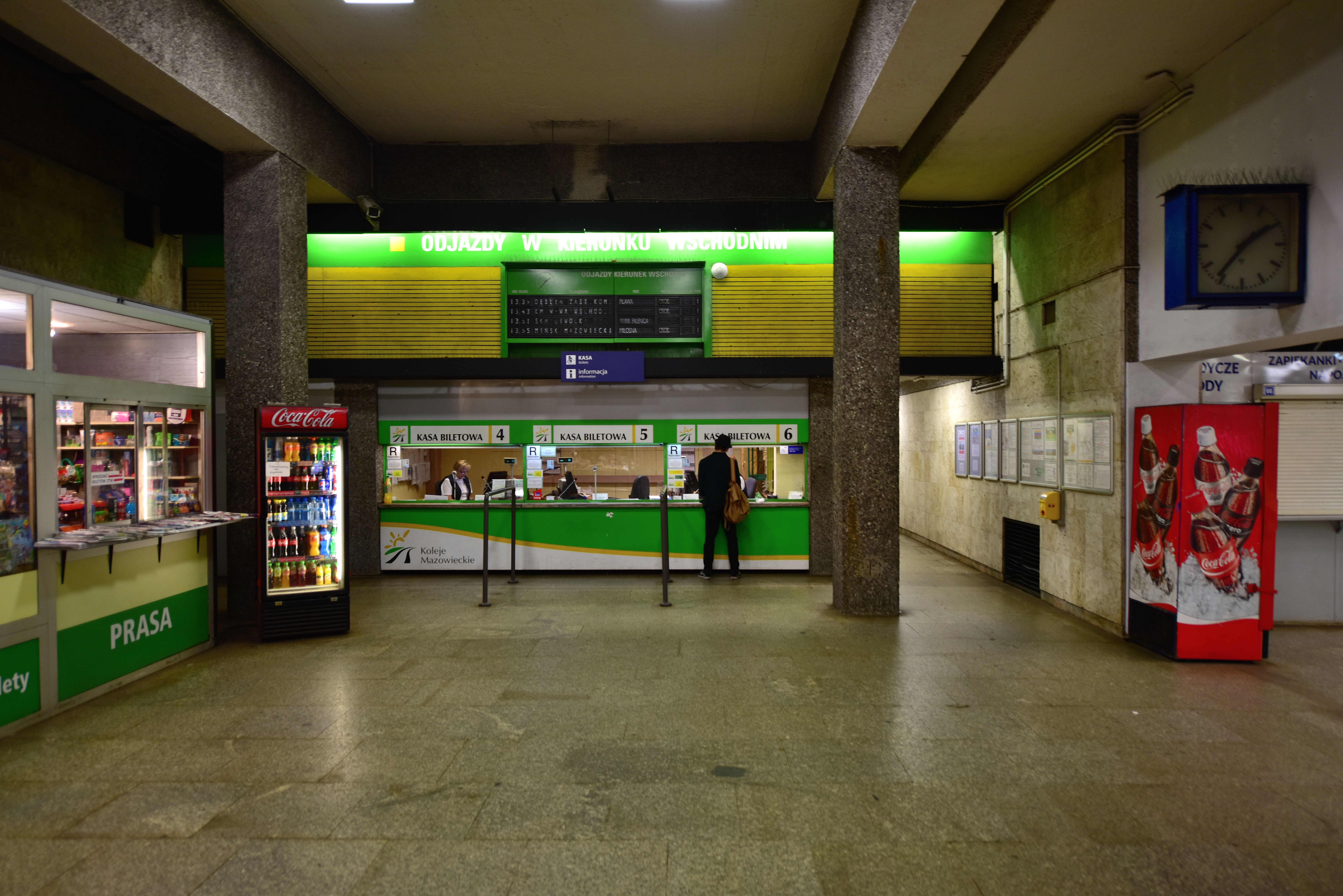 Dworzec Warszawa Śródmieście w Warszawie